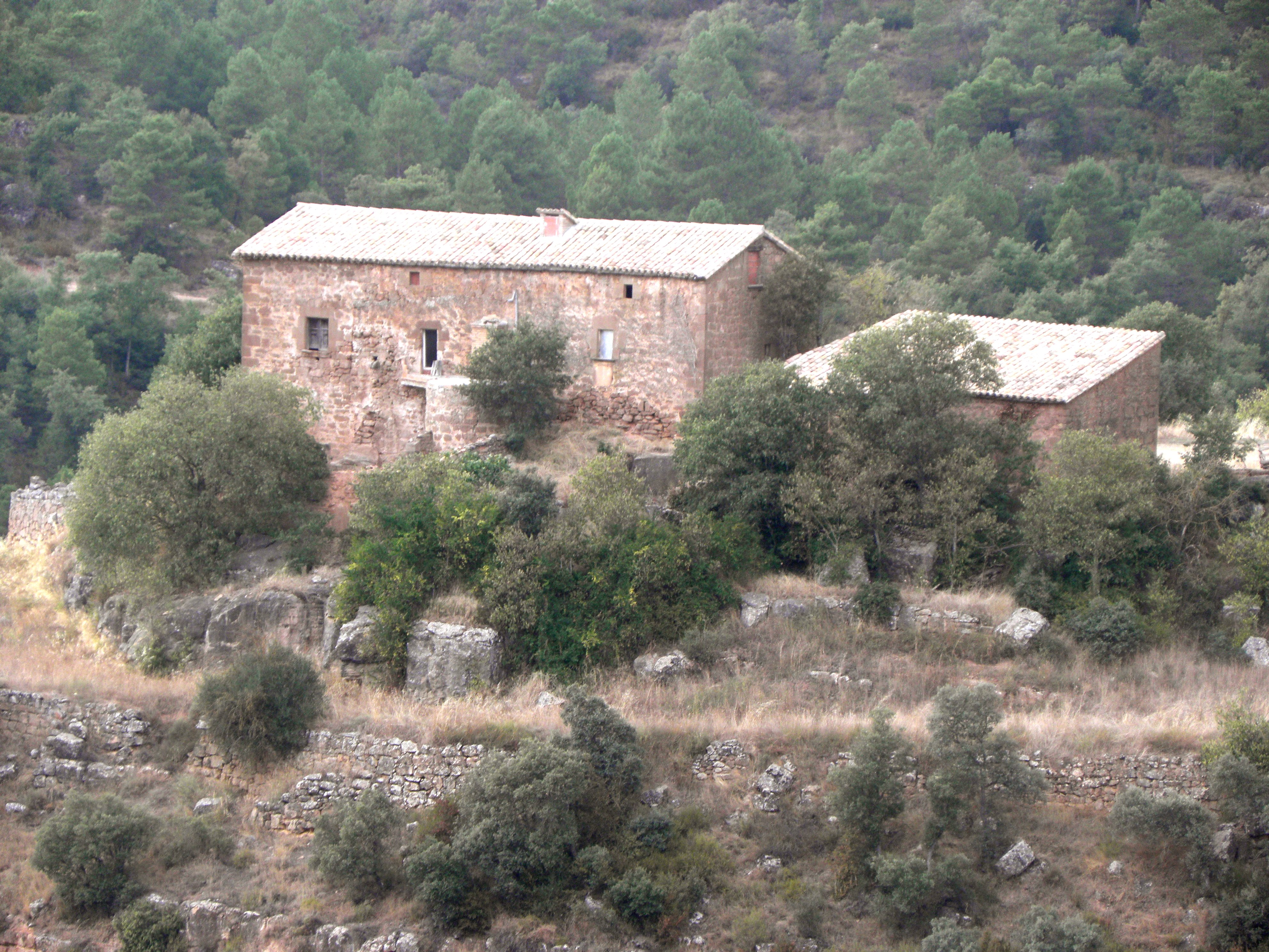 La masia de Cal Batlle, al poble de Sallent (Pinell de Solsonès), vista des de la masia de Cucurull, a l'est.